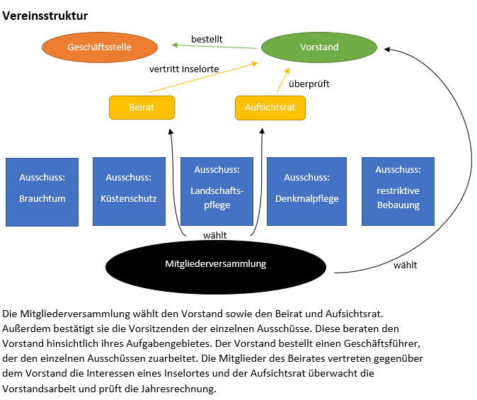 Aufbau des Vereins Sölring Foriining